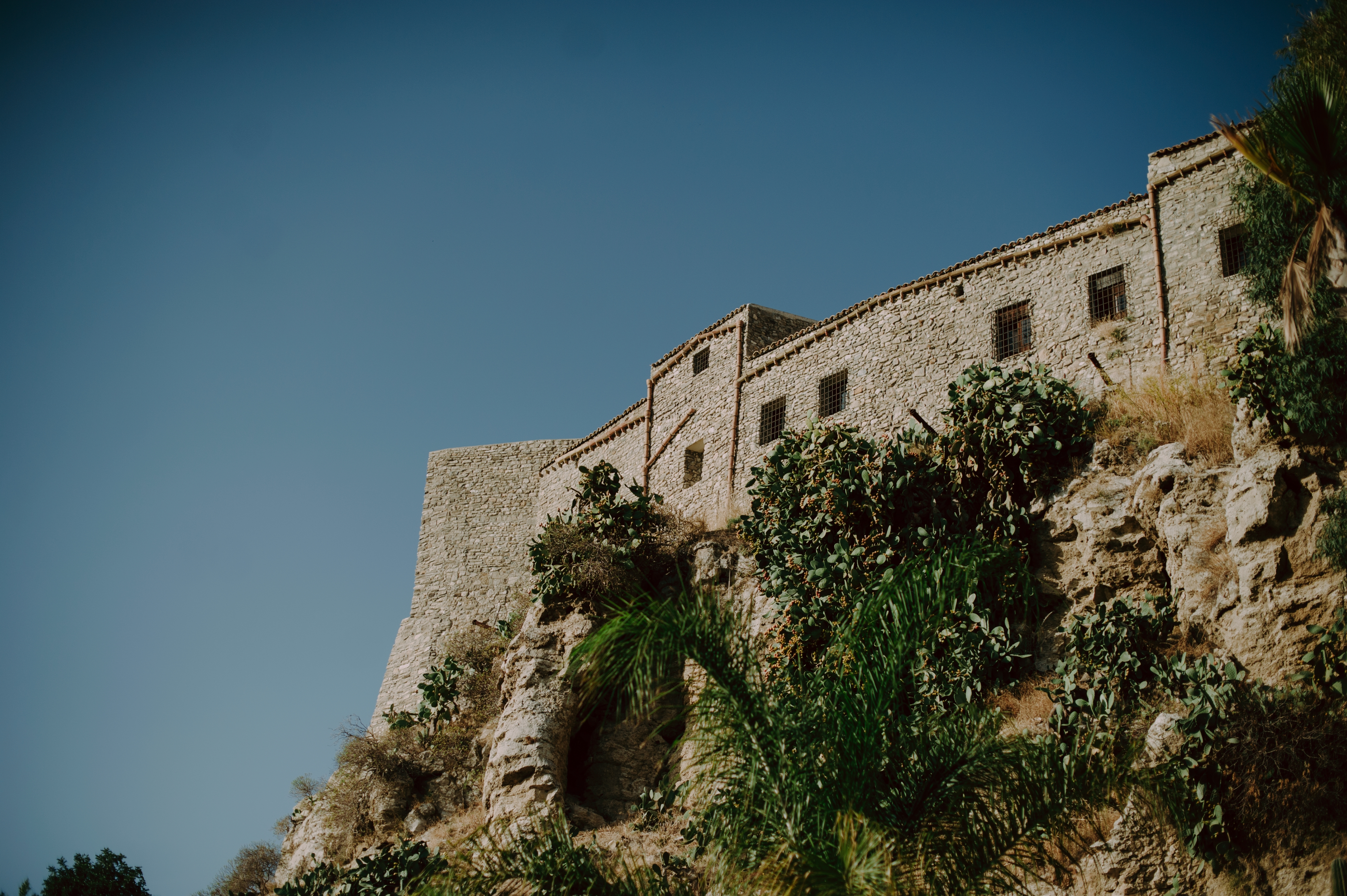 Panoramica del castello Chiaramonte di Siculiana